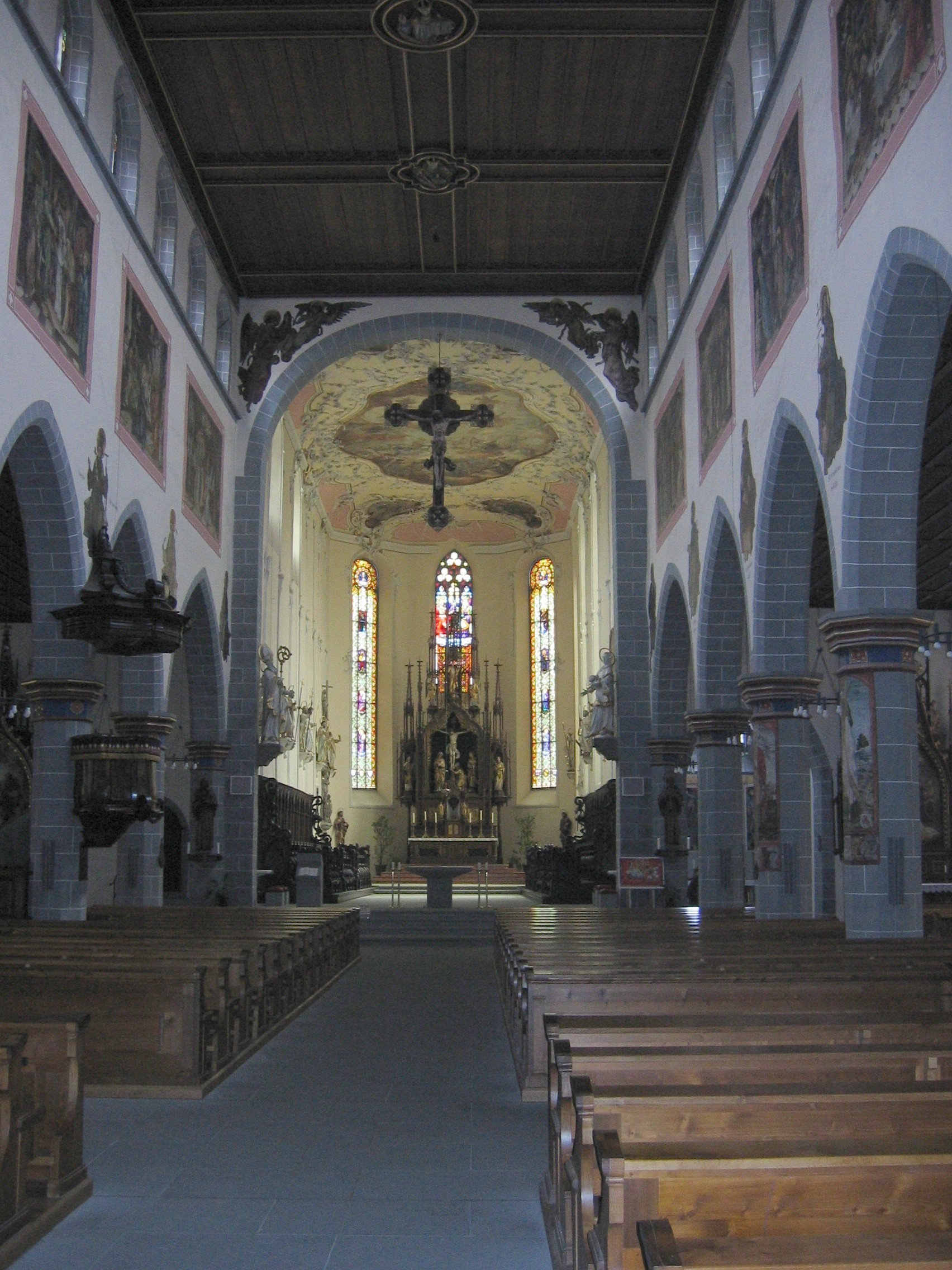 Innenansicht der St. Stephanskirche zu Konstanz.